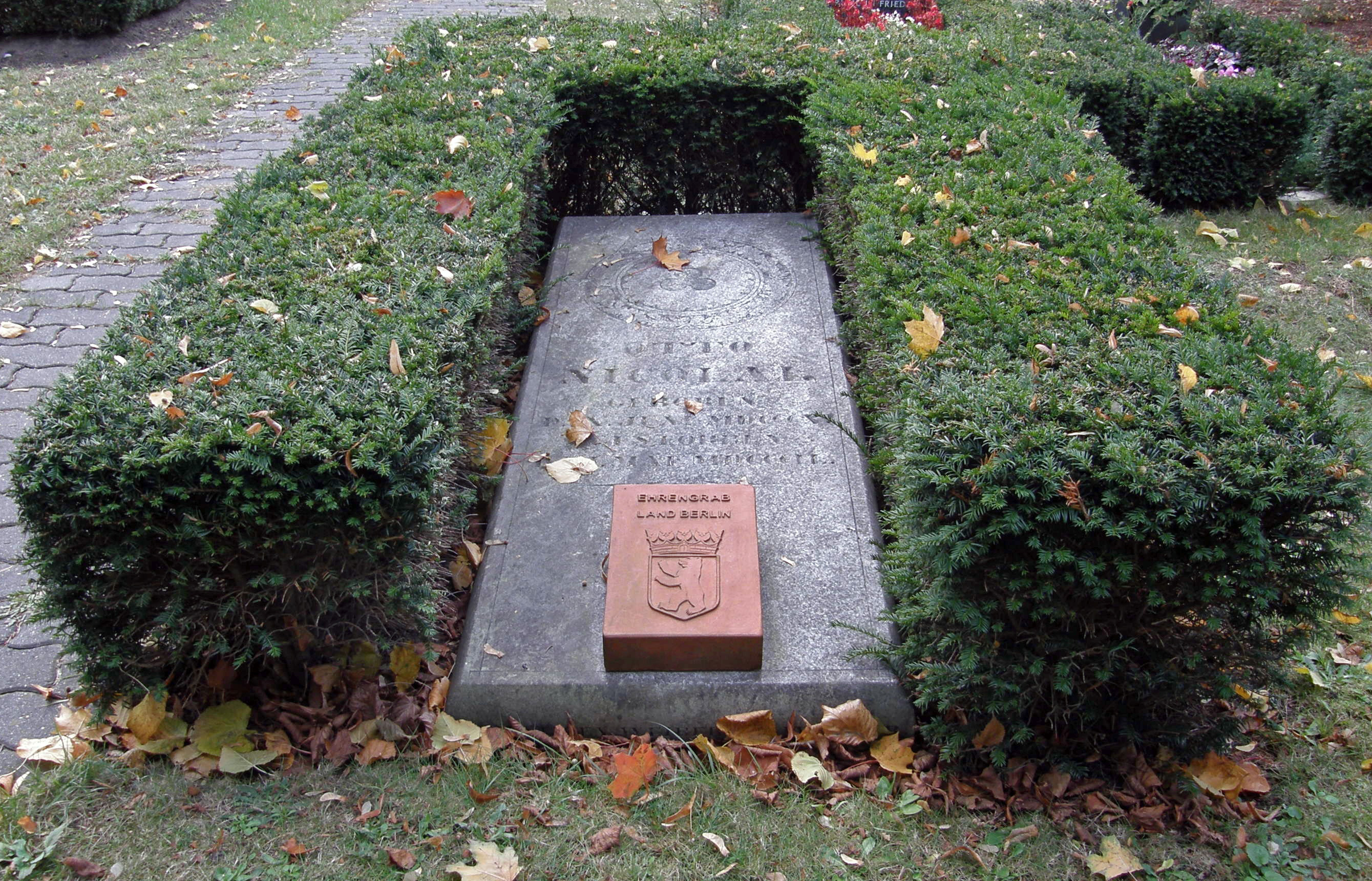 Grab von Otto Nicolai auf dem Dorotheenstädtischen Friedhof II in Berlin-Wedding.